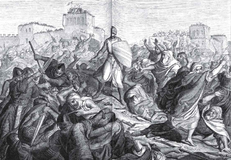 El Cid luchando en los arrabales de Valencia (c. 1093) con el fin de conquistarla